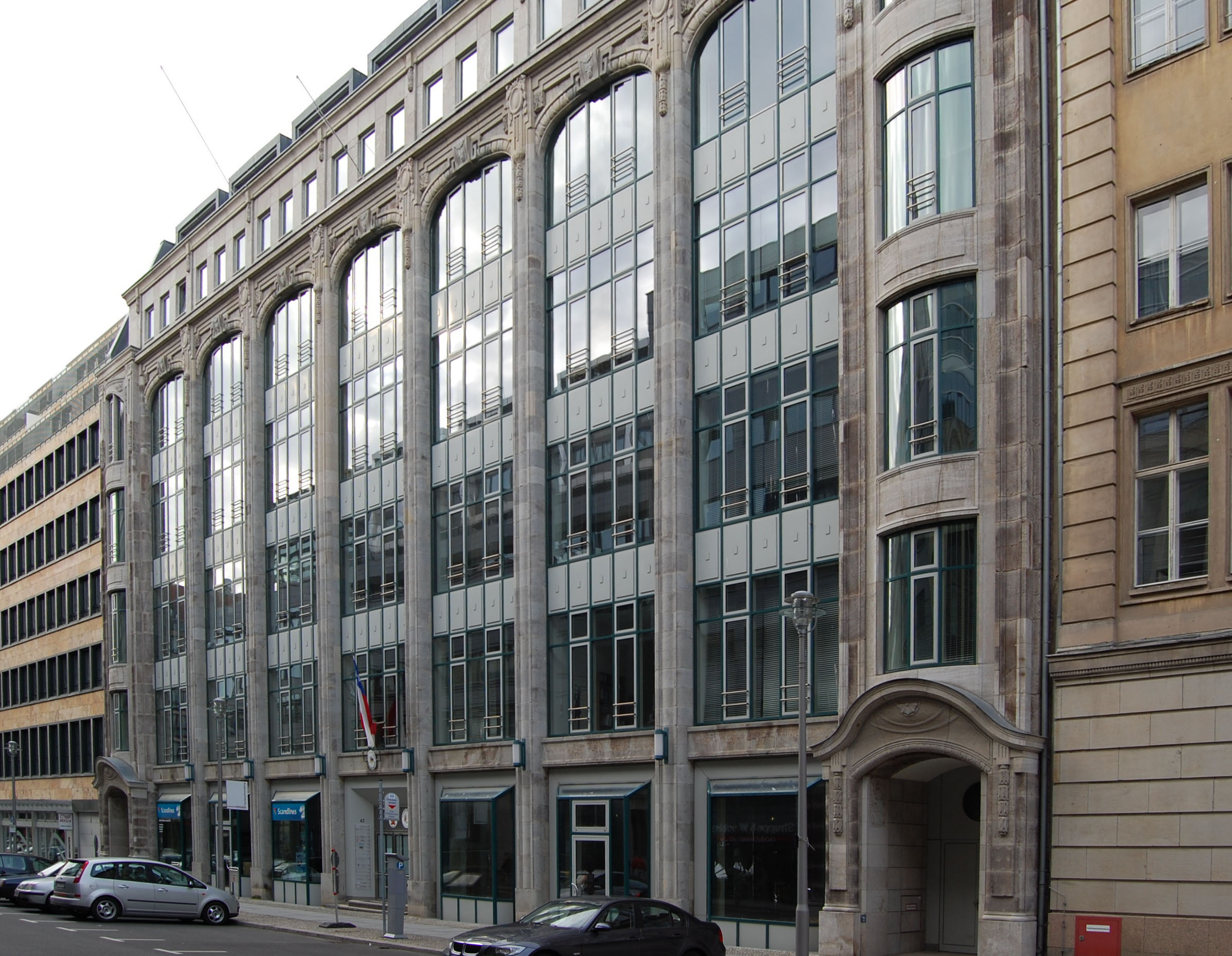 Embassies of Chile, Peru and Liechtenstein in Berlin